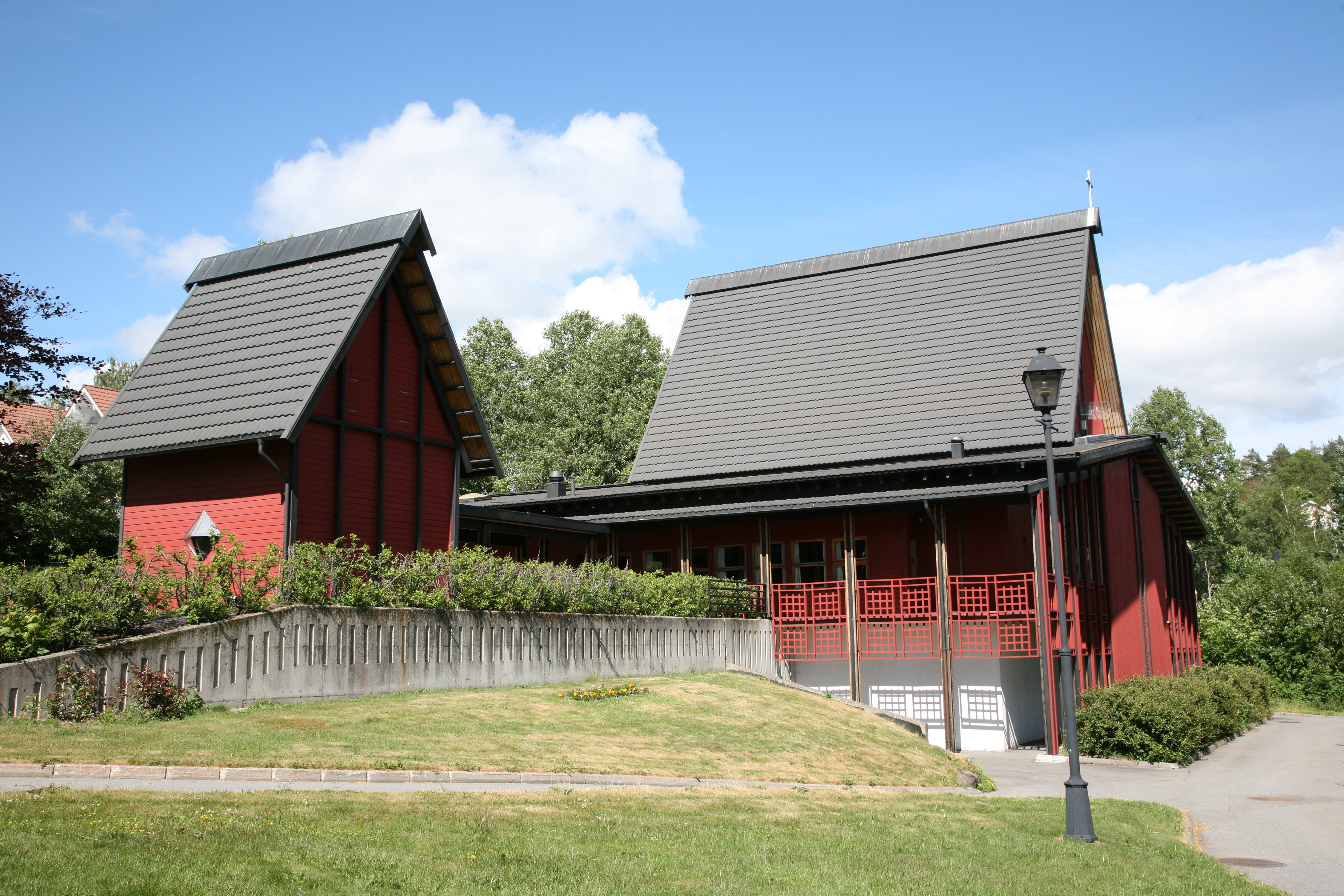 Fjellhamar church in Lørenskog, Akershus, Norway